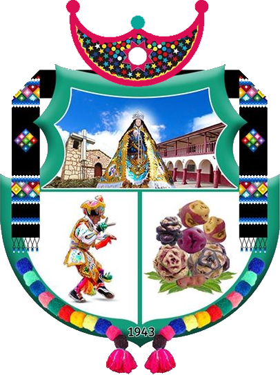 Paucará, Huancavelica